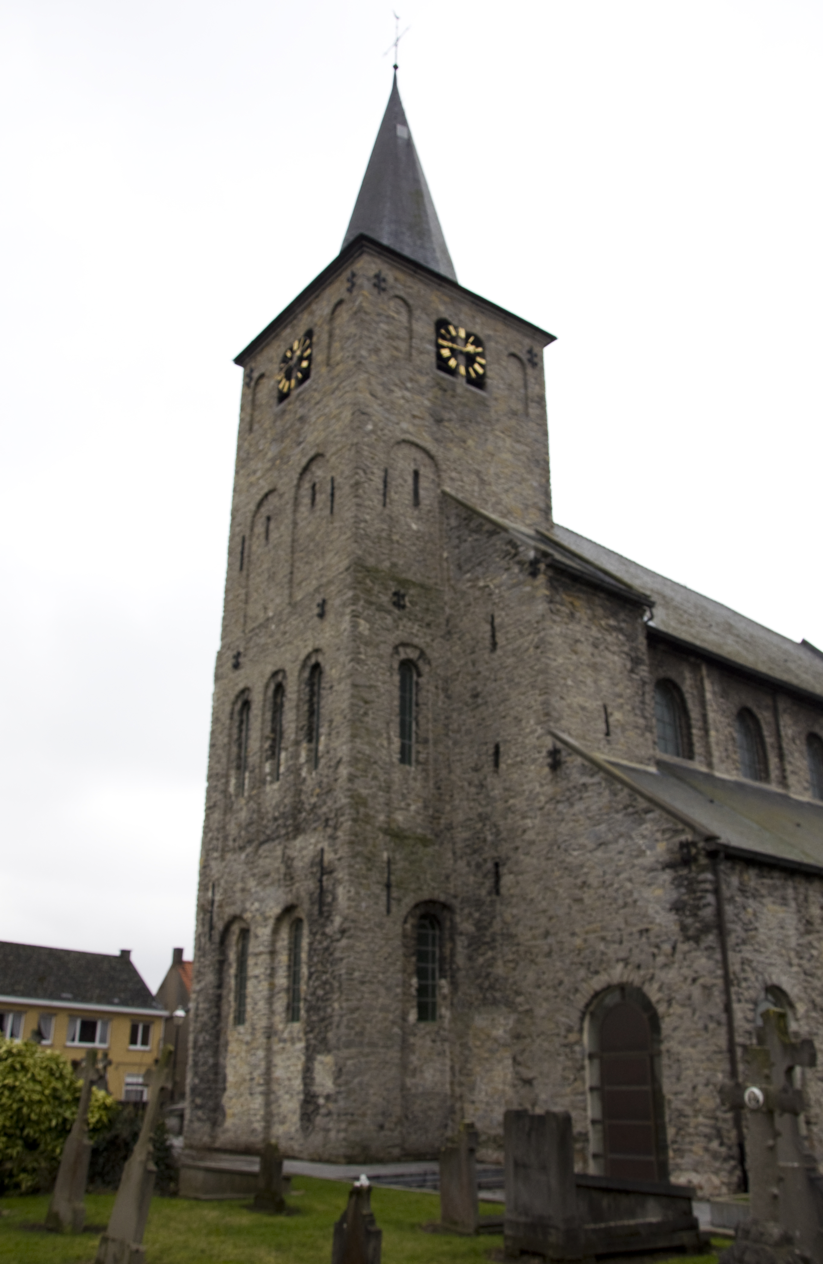 Sint-Laurentiuskerk te Ename, België